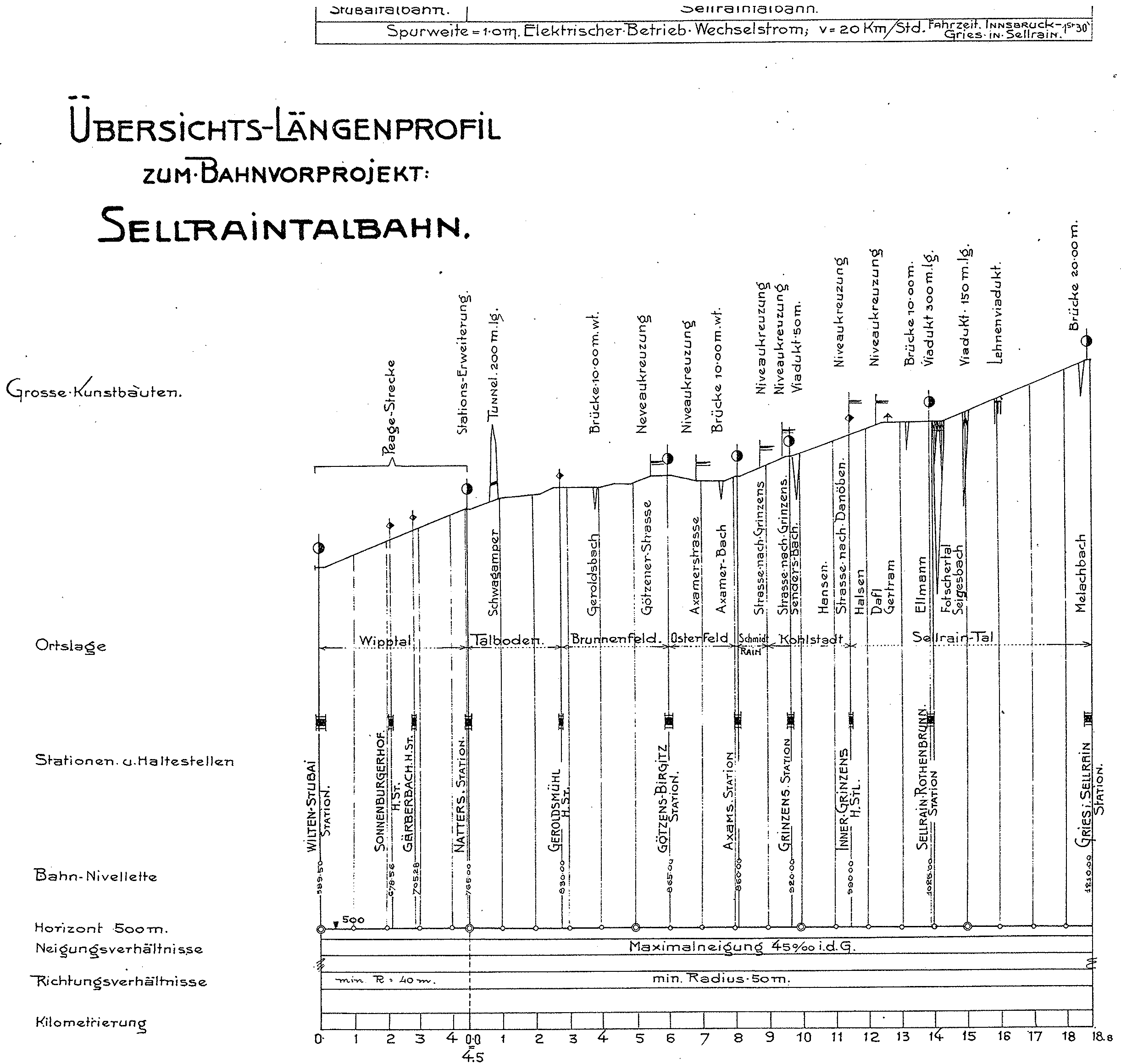 Längsprofil der geplanten Sellrainbahn, abzweigend von der Stubaitalbahn